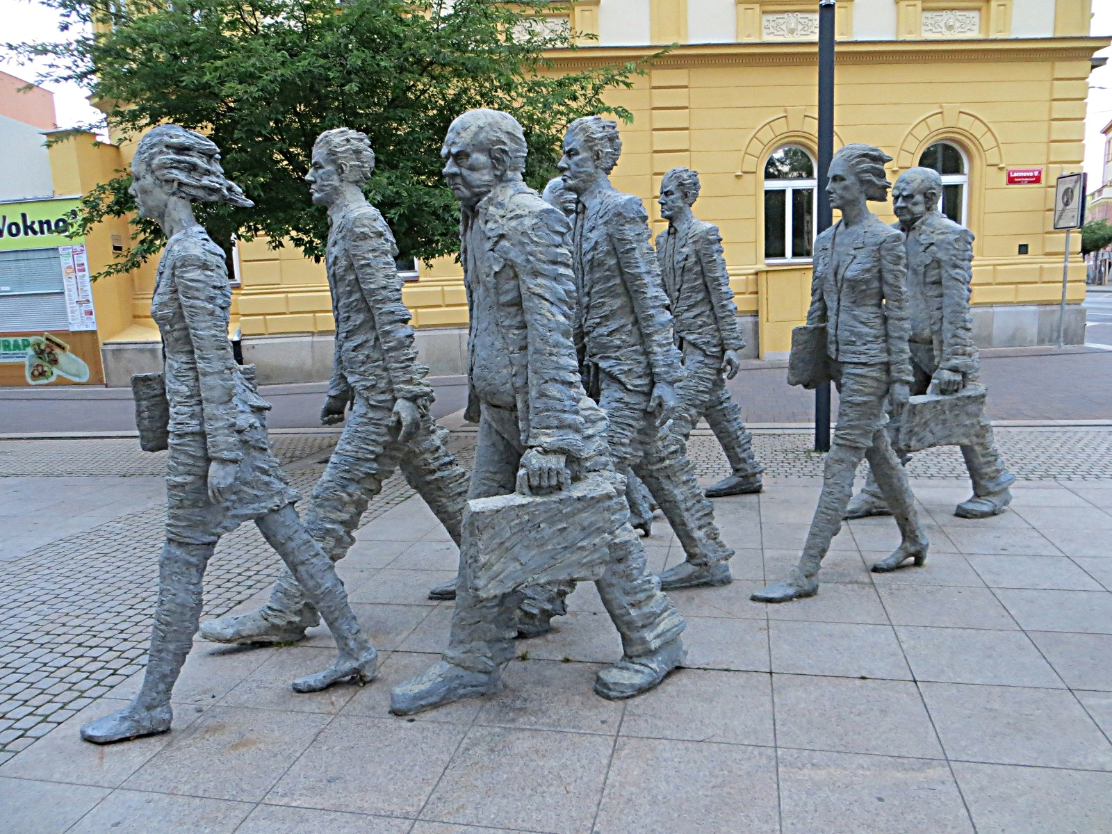 Humanoidi - Michal Trpak (2009)